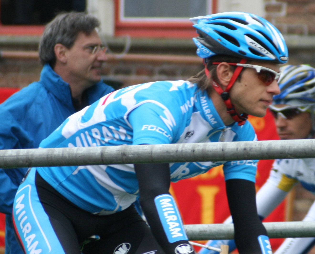 Artur Gajek au départ du Tour des Flandres 2009